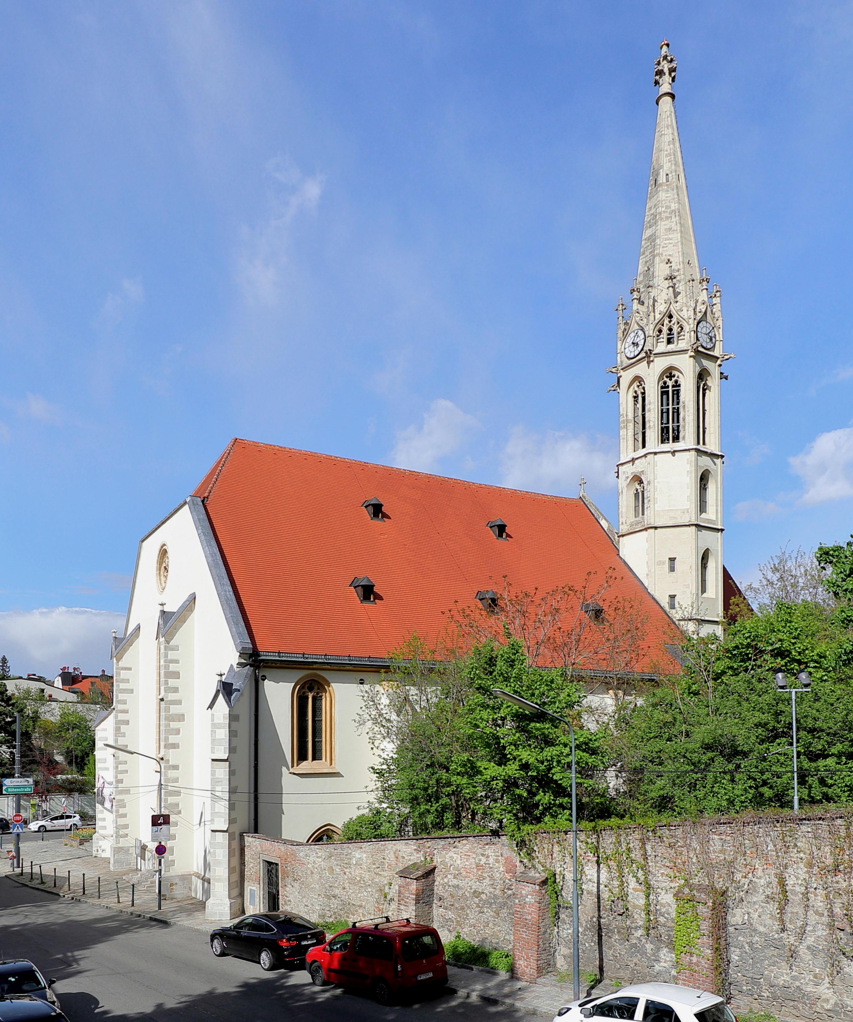 Die Südwestansicht der Pfarrkirche St. Michael in Heiligenstadt, ein Bezirksteil des 19. Wiener Gemeindebezirkes Döbling.Ein dreischiffige Staffelkirche, die unter Einbeziehung der Grundmauern und des Chores der Vorgängerkirche im neugotischen Stil und ähnlich der Vorgängerkirche (bis auf den Turm) nach Plänen von Richard Jordan, unter Beteiligung von Martin und Josef Schömer, ab 1894 errichtet und am 26. Mai 1898 eingeweiht wurde.